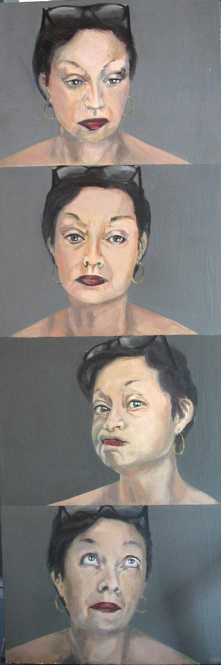 Peinture